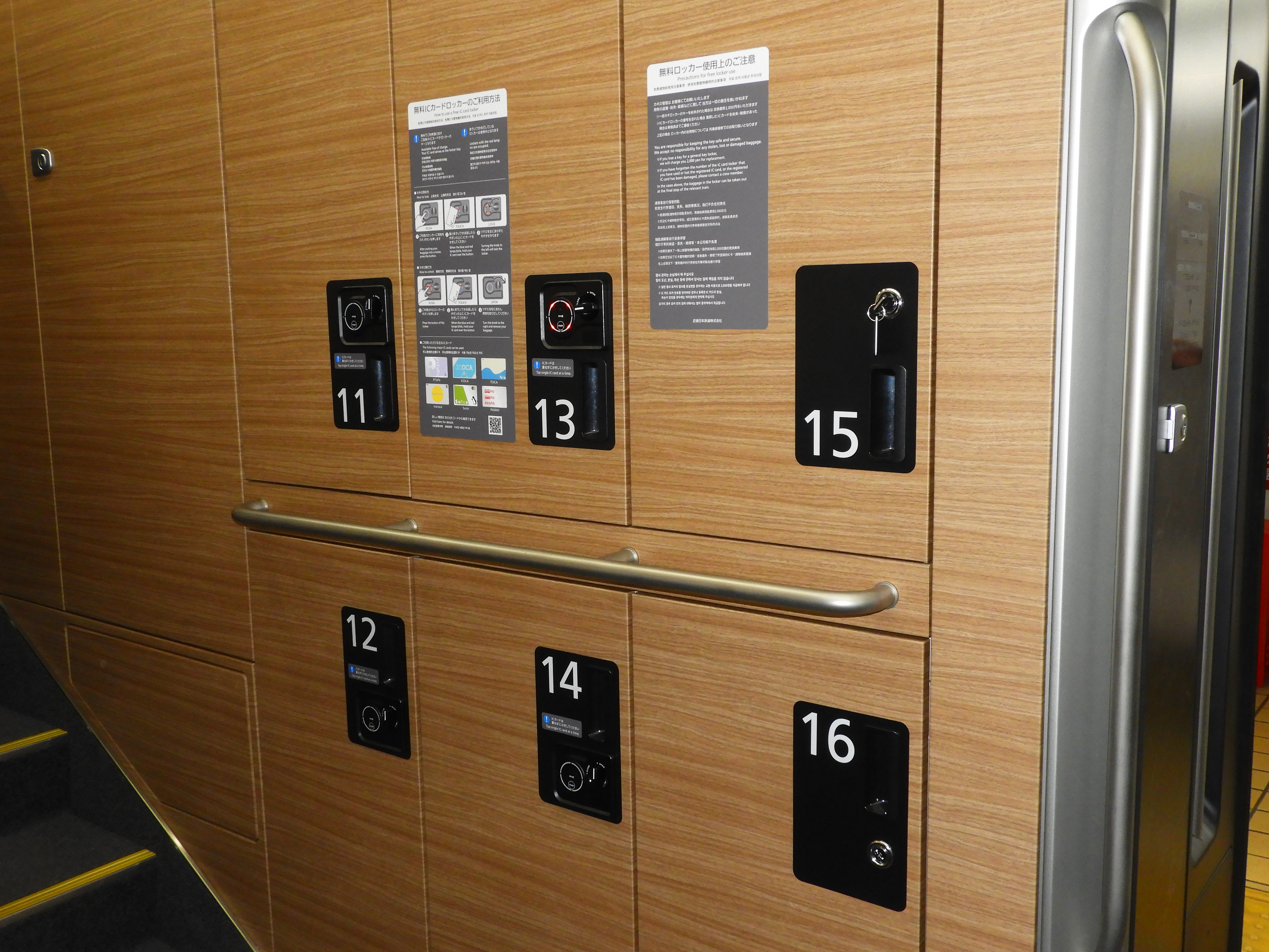 近鉄80000系の車内に設置されている無料ロッカー